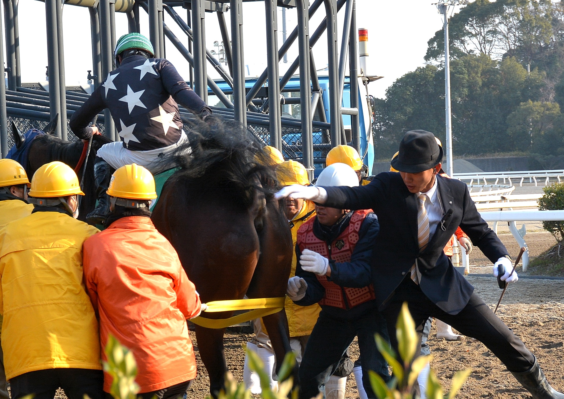 2014年1月1日の高知競馬場で第4競走のスタート直前に、8番バリバリ号（騎手：宮川実）がスターティングゲート入りを拒んでいる為、関係者がバリバリ号を何とかゲート内へ入れて発馬させようとしている場面を、観客席から撮影したもの。